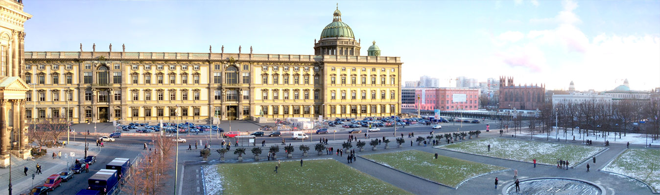 Computervisualisierung des Berliner Schlosses, sichtbar die Lustgartenfassade mit den Portalen IV und V, links im Anschnitt der Berliner Dom.